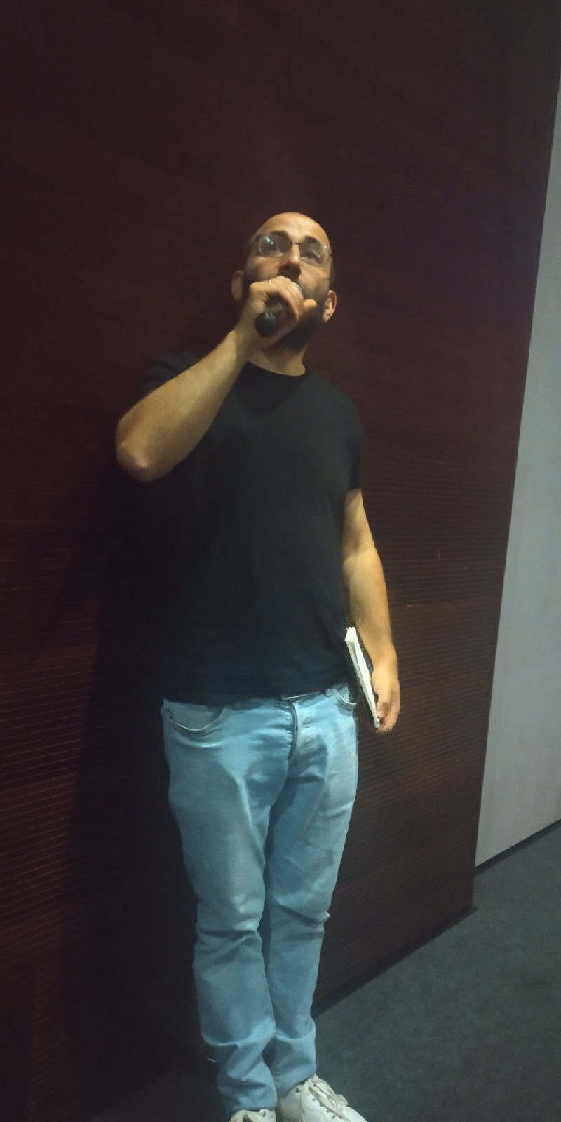 Кинорежиссер Михаил Местецкий в Екатеринбурге